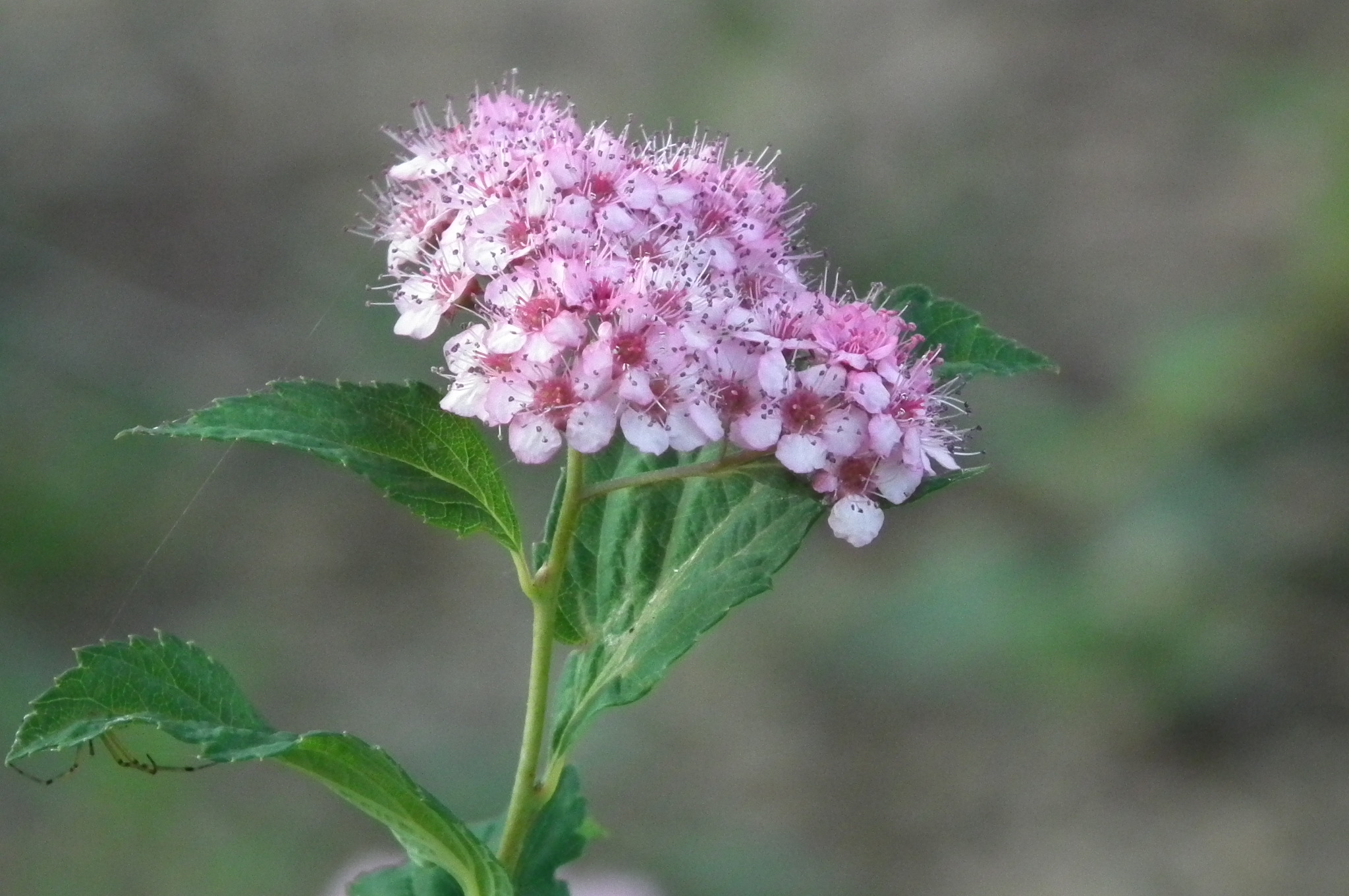 Spiraea japonica シモツケ（下野)